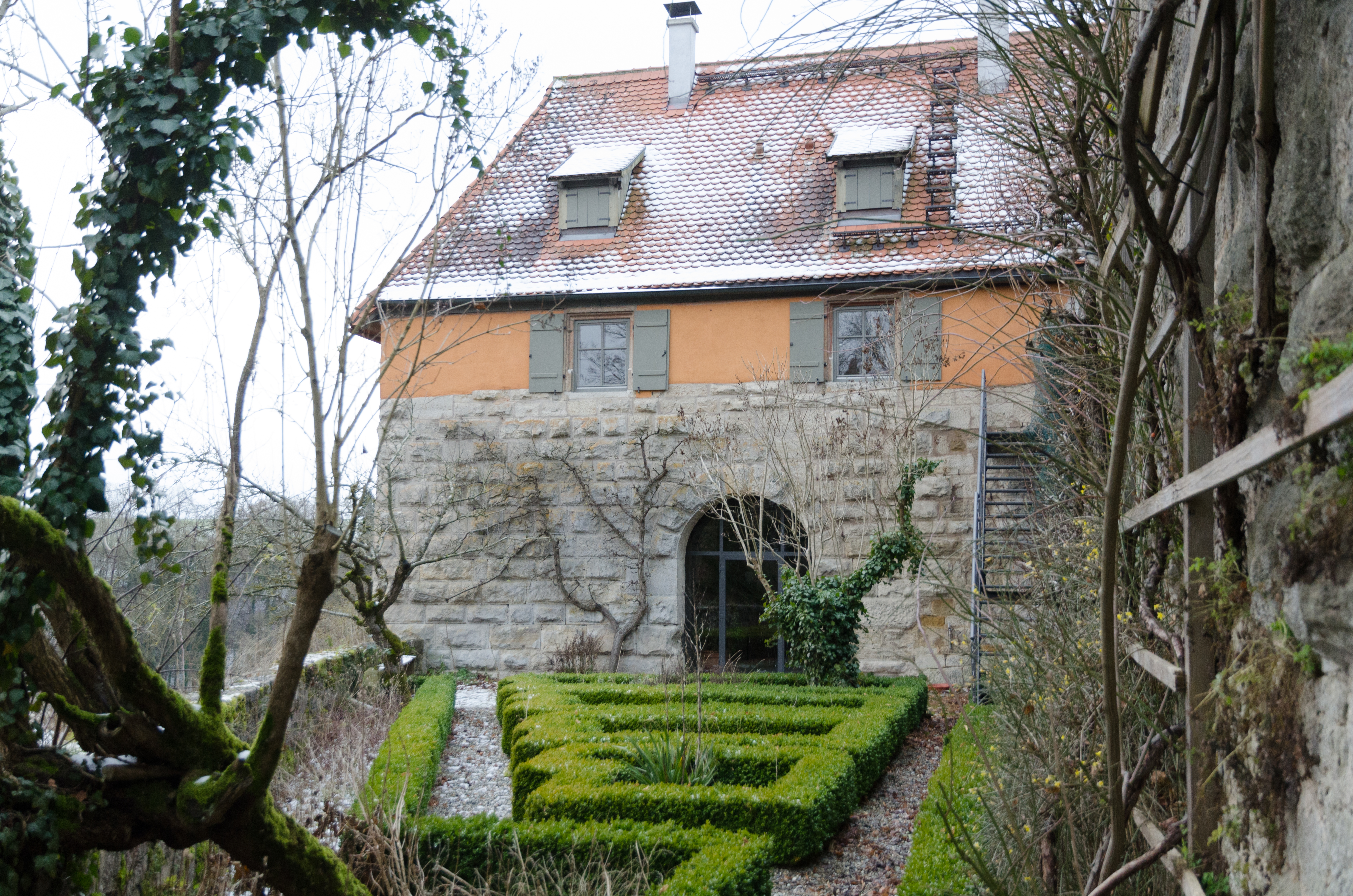 Rothenburg ob der Tauber, Burgmauer, Alte Burg, Südseite